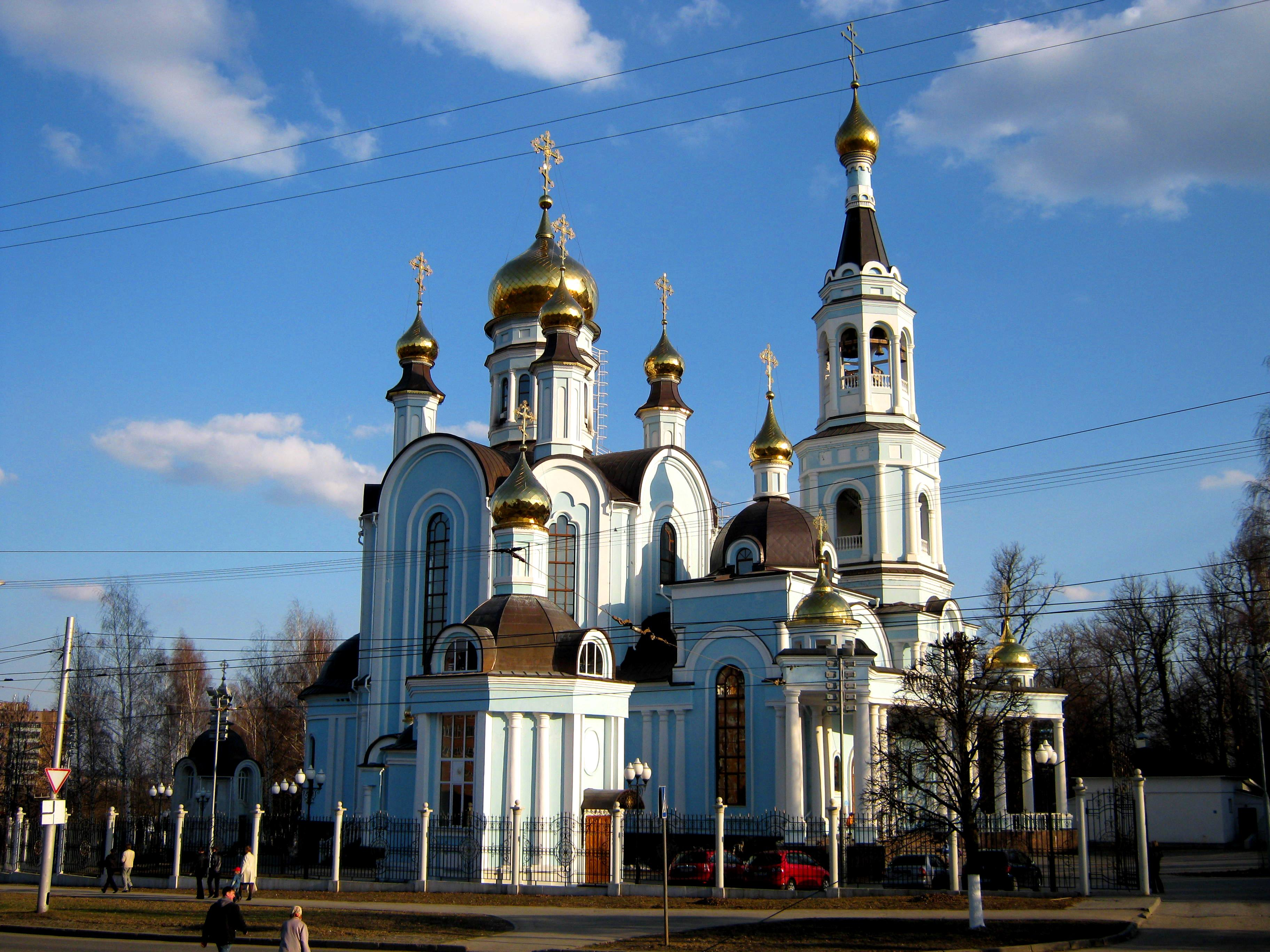 Покровско-Татианинский собор (Чебоксары)